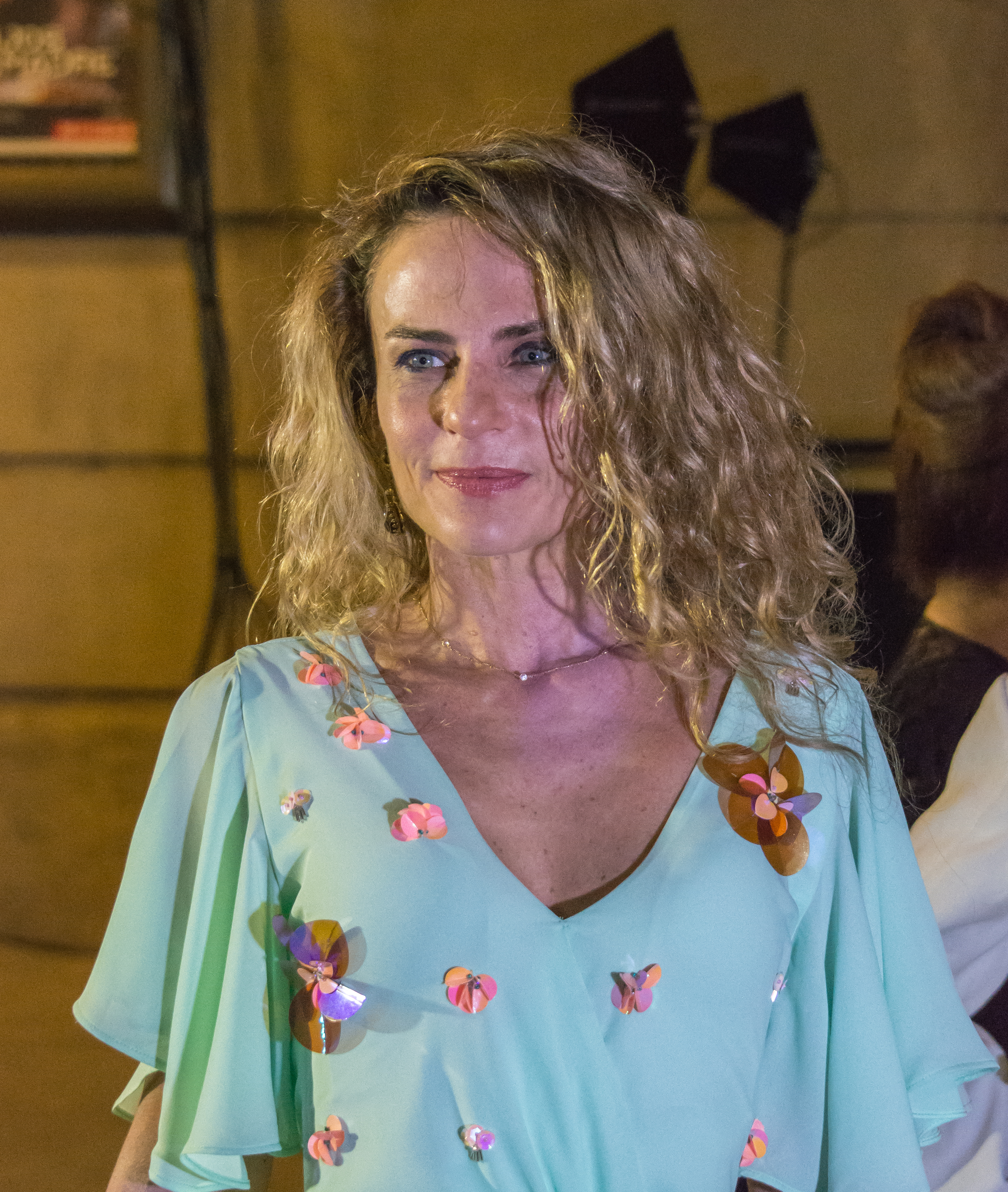 Alessandra Guerzoni, Premios Caleuche, Teatro Oriente, Providencia, Santiago, Región Metropolitana de Santiago, Chile.